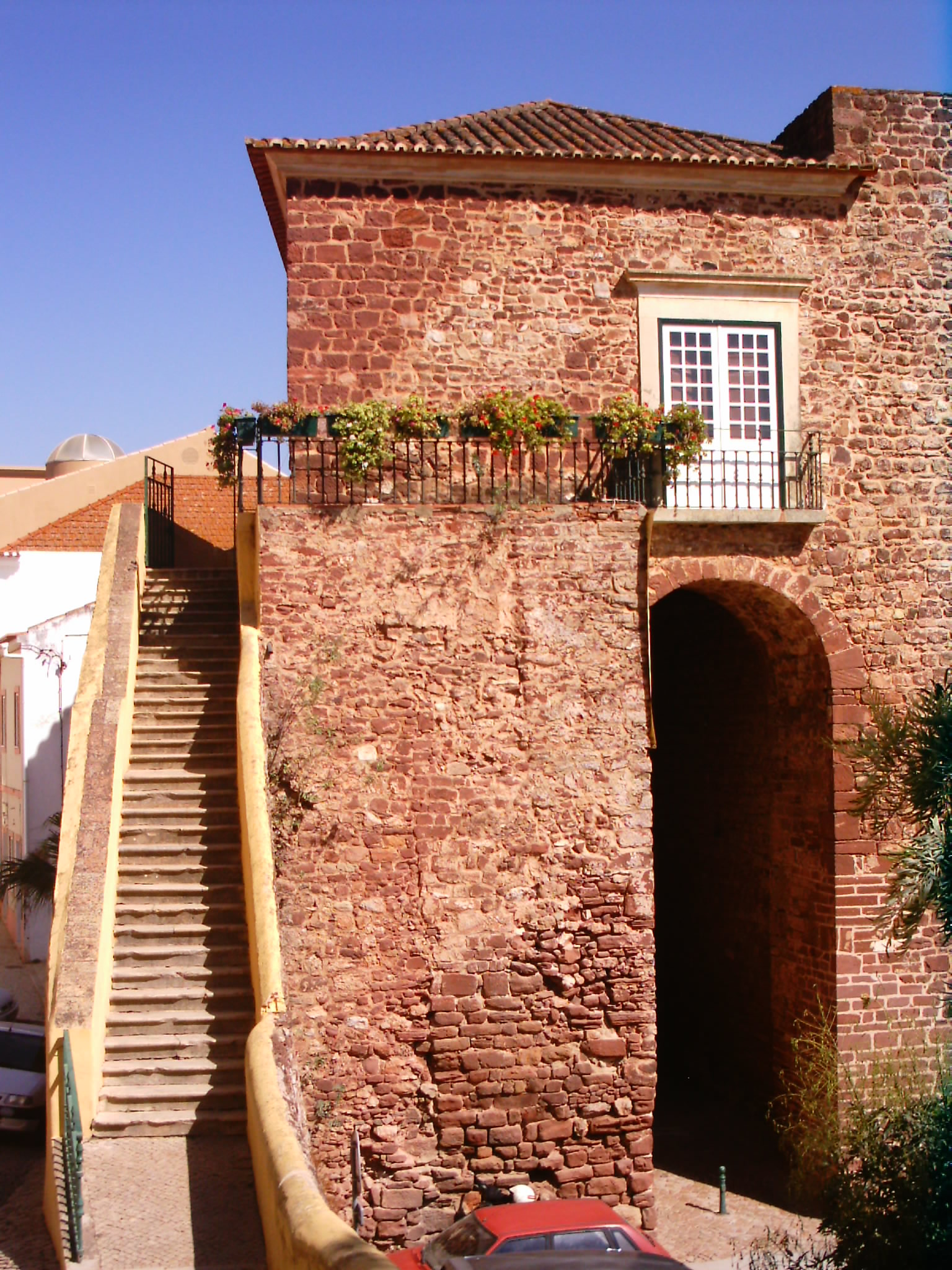 Portas da cidade, Silves, Portugal.